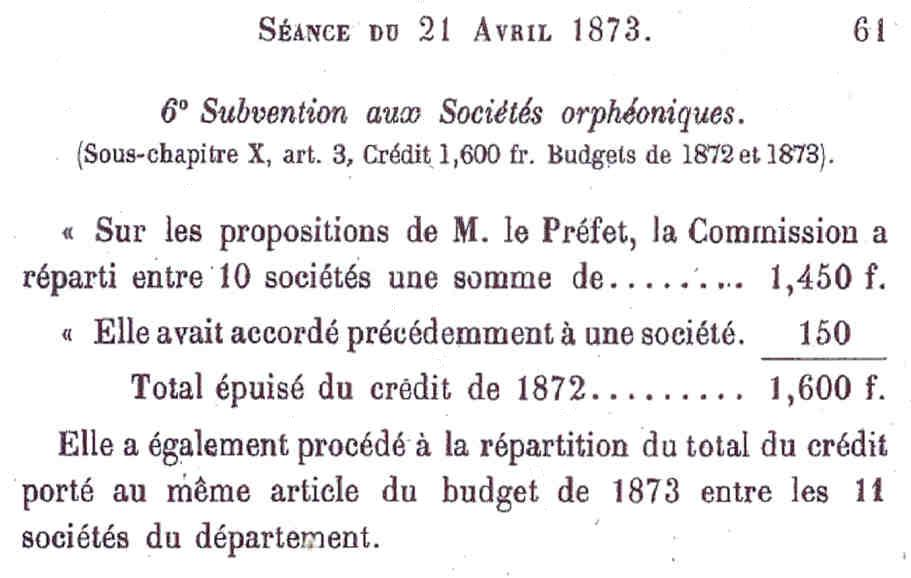 Relevé des subventions aux sociétés orphéoniques du département de la Mayenne.